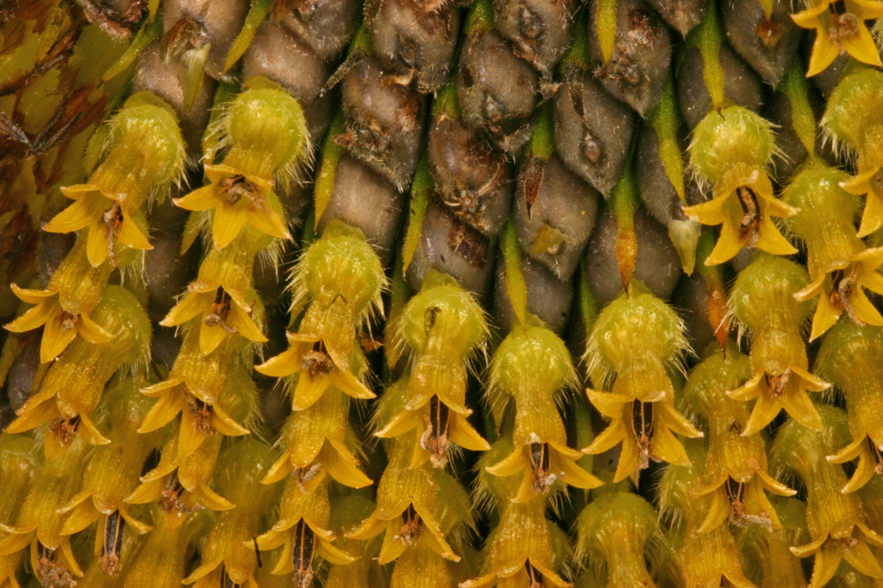 Nahaufnahme der Kerne noch an der Sonnenblume